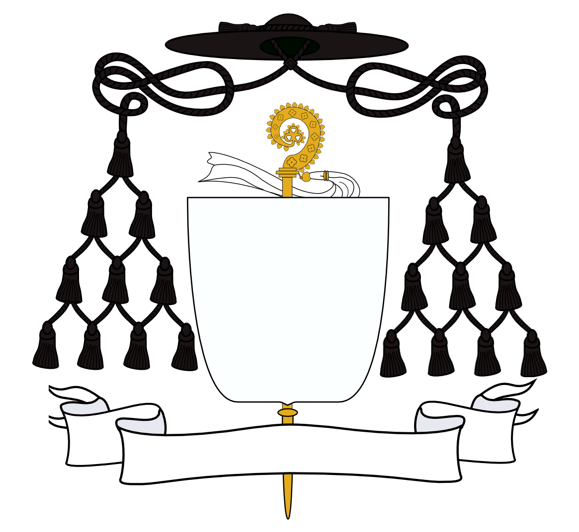 Wappen eines Erz-/Generalabtes